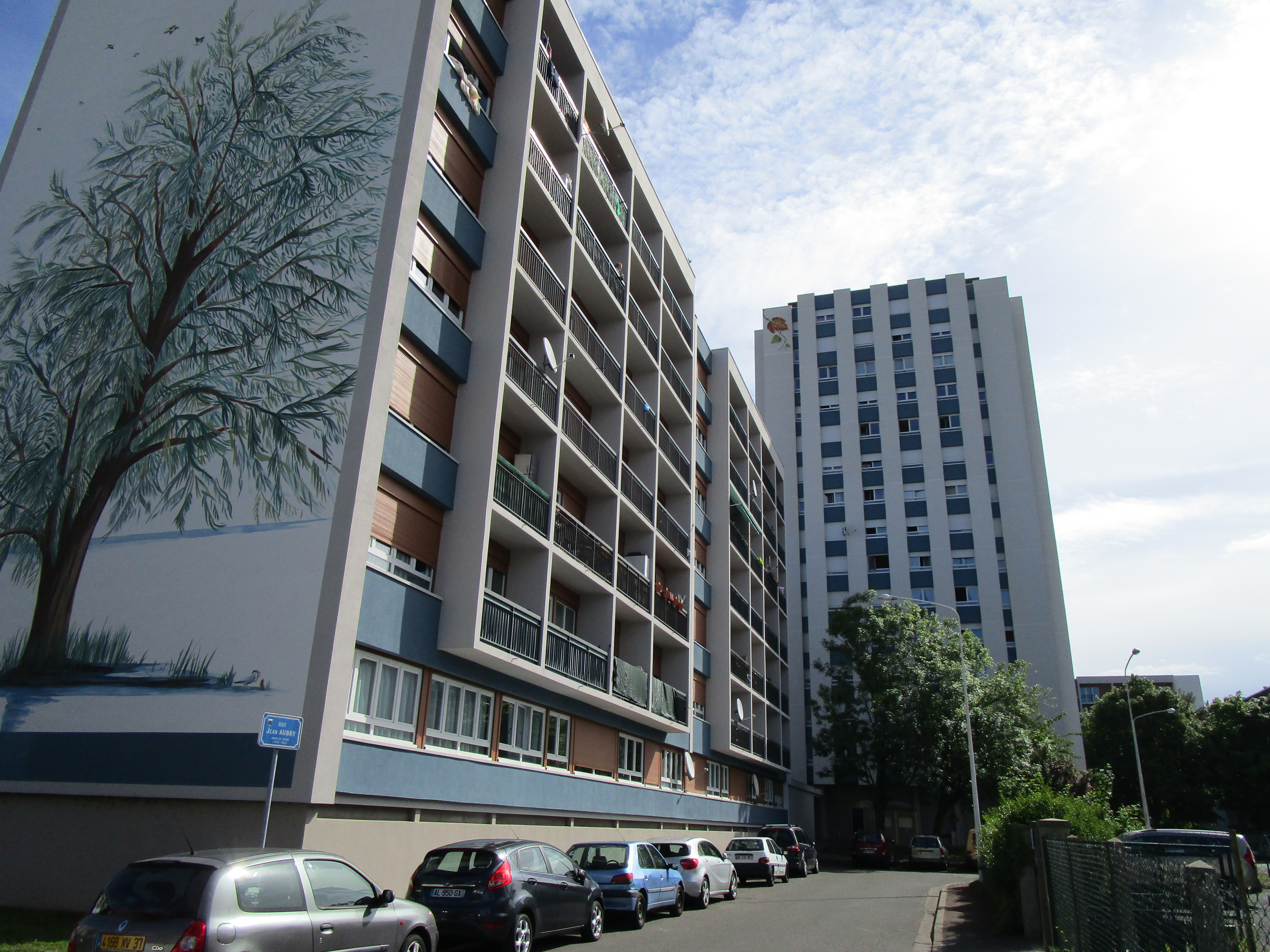 Vue de la rue Jean Aubry, dans le secteur Pasteur du quartier Sanitas, à Tours